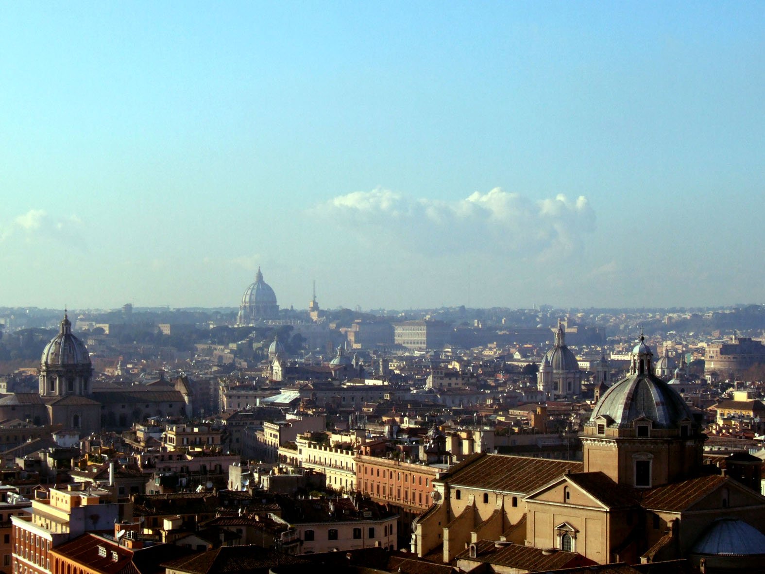 Cupole di Roma, dal Vittoriano